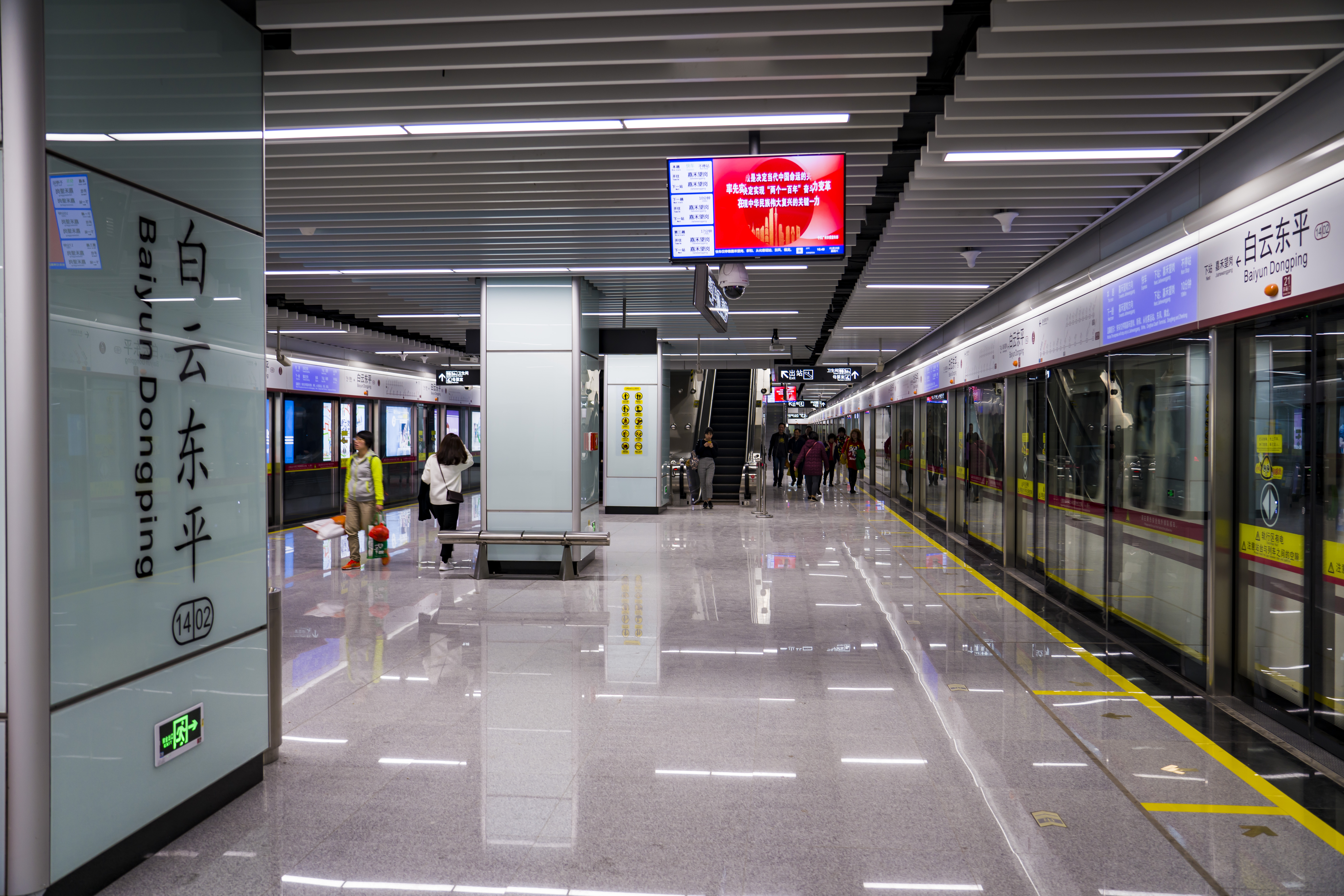 白云东平站2号月台